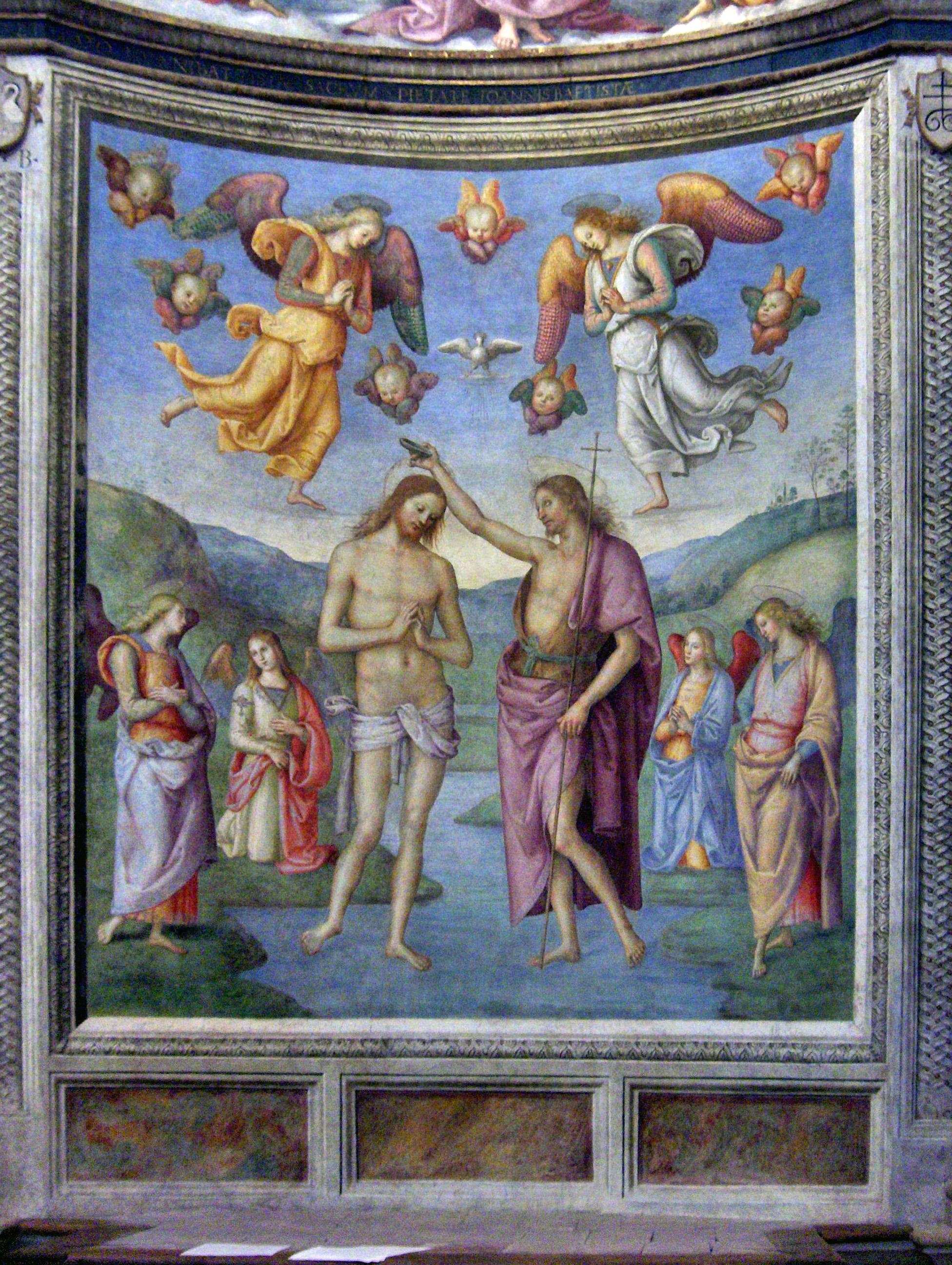 Baptism of Jesus (1507) by Perugino; Oratorio della Nunziatella; Foligno, Italy